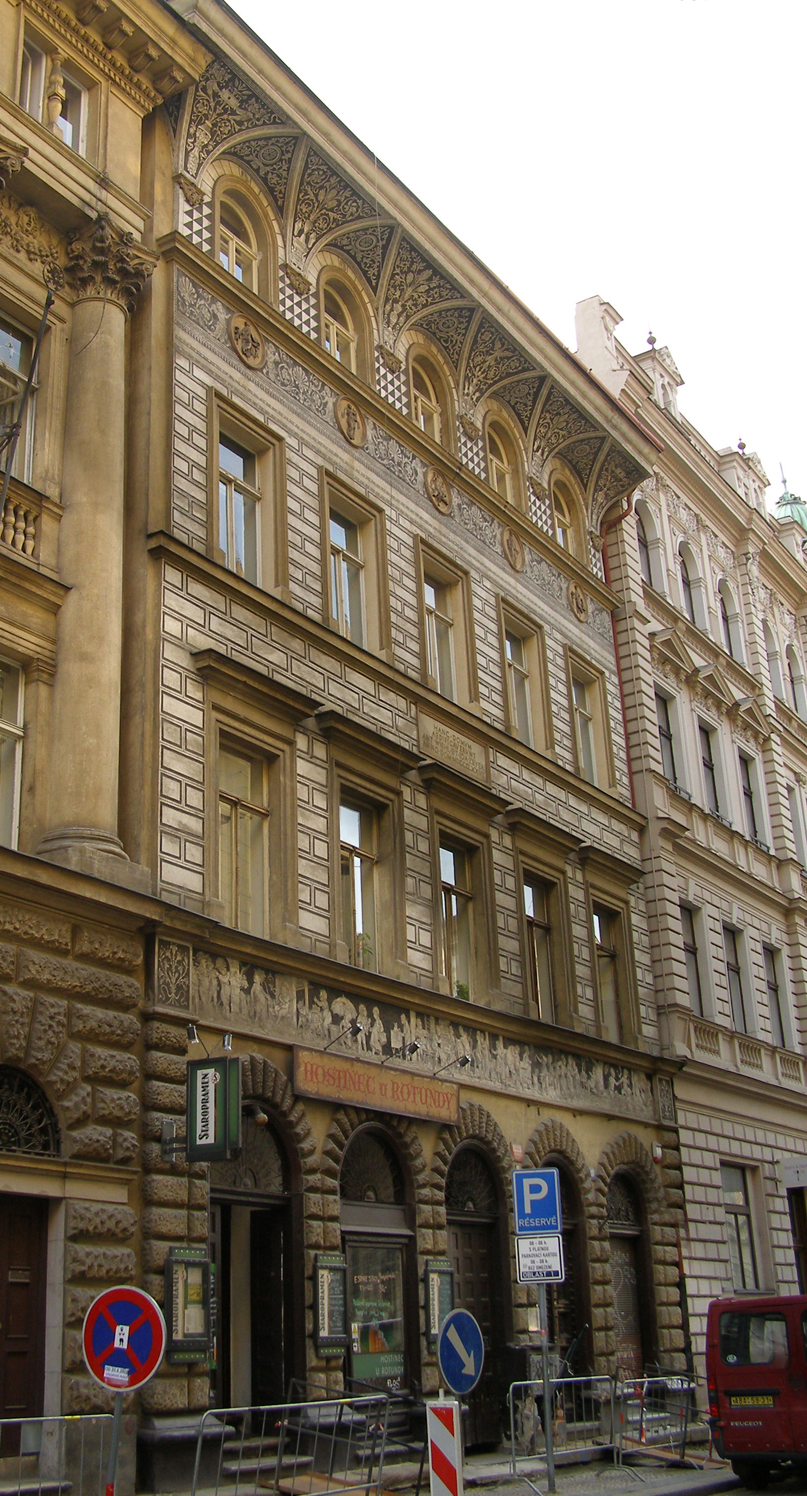 Praha 1-Staré Město, Karoliny Světlé 1035/17.